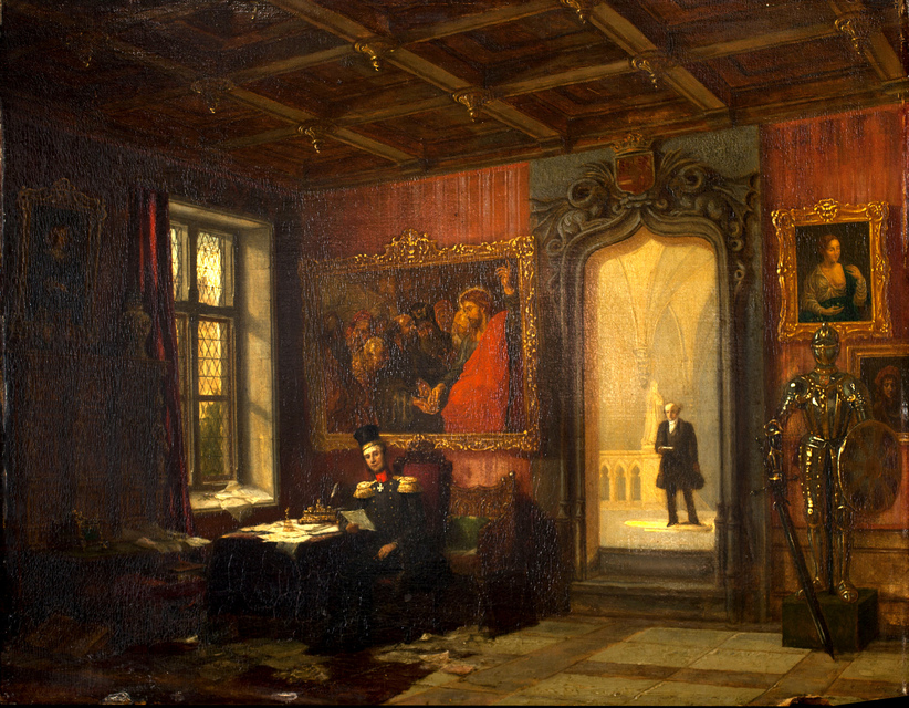 Koning Willem II in zijn werkkamer. Op dit schilderij uit 1847 van Aug. Wijnantz kijkt Victor Amadeo Trossarello, beheerder van de koninklijke kunstverzameling, ons vanuit de deuropening aan. Op de voorgrond zit de Koning in zijn werkkamer in Paleis Kneuterdijk te lezen onder Rubens 'De penning van de keizer'. Aan de rechter bovenkant van de toegang hangt 'La Colombina' van Francesco Melzi.